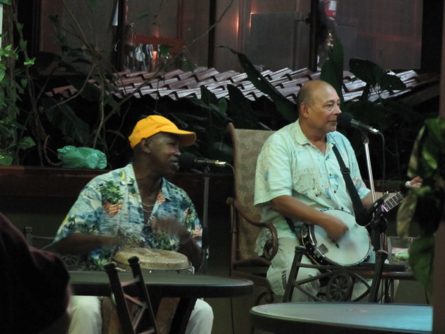 Banda de calipso en Limón, Costa Rica.